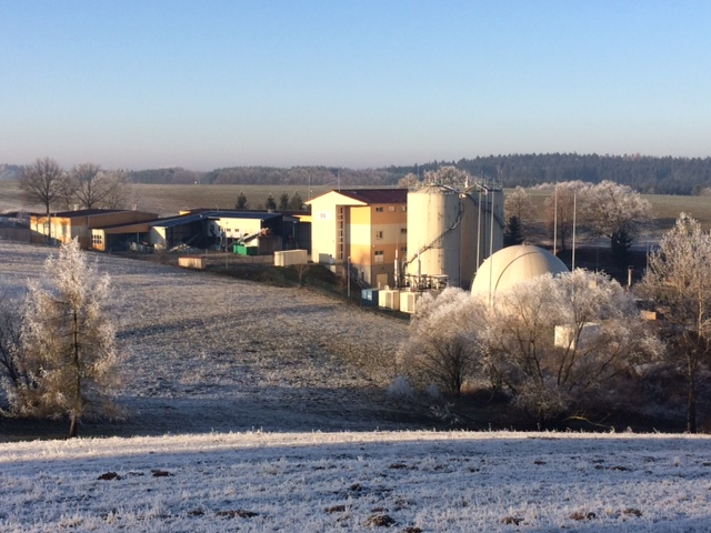 BIO PLYN